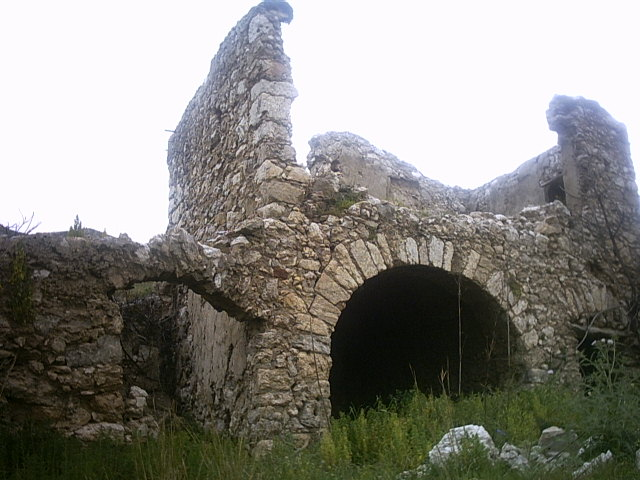 Foto miniera abbandonata di zolfo (Cianciana)